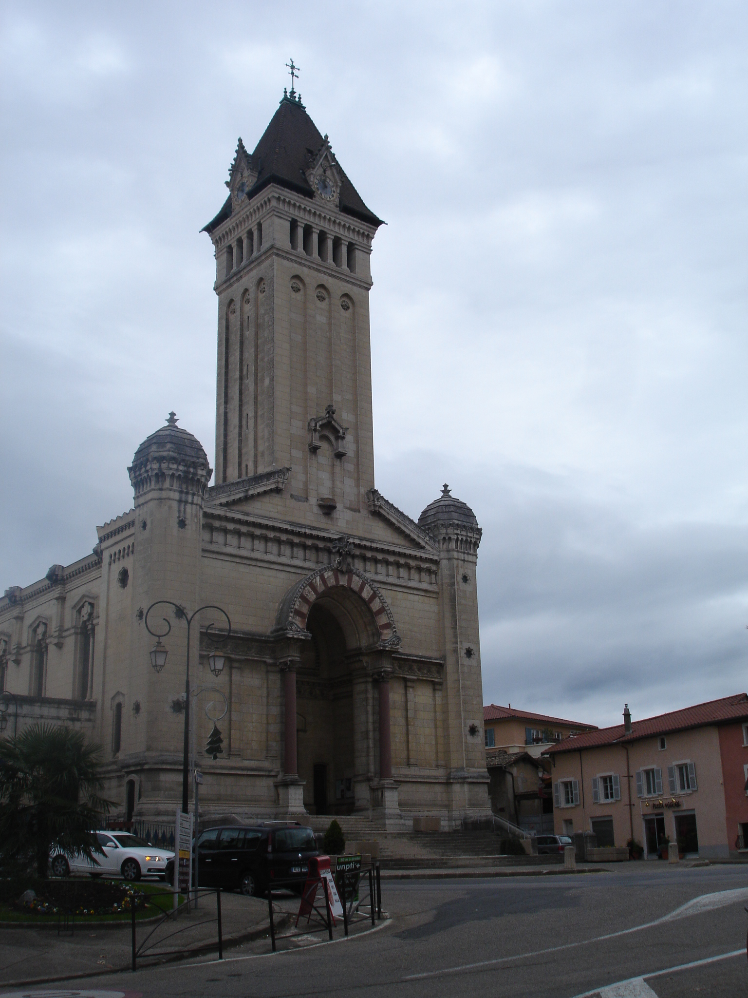 L'église de Chaponost dans le Rhône (69)